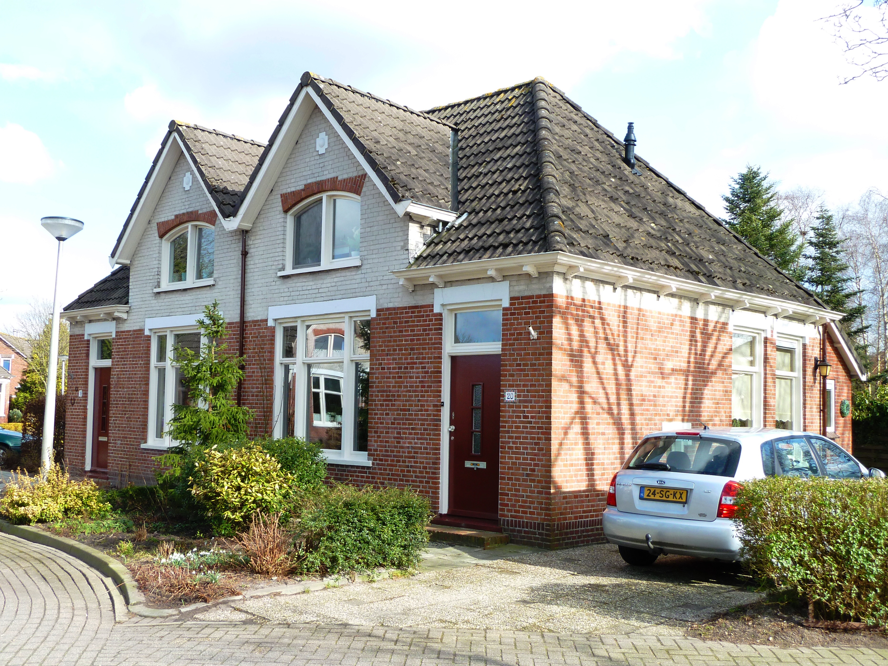 Dubbele arbeiderswoning met twee topgevels aan de Walfriduslaan 18-20 in Bedum. Gebouwd rond 1915 naar ontwerp van Klaas Siekman.